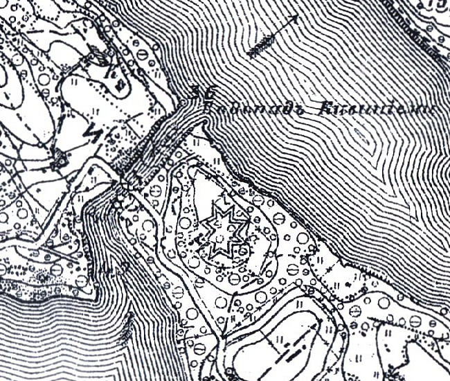 Кивиниемский редут на листе карты XI-55 1891 года.